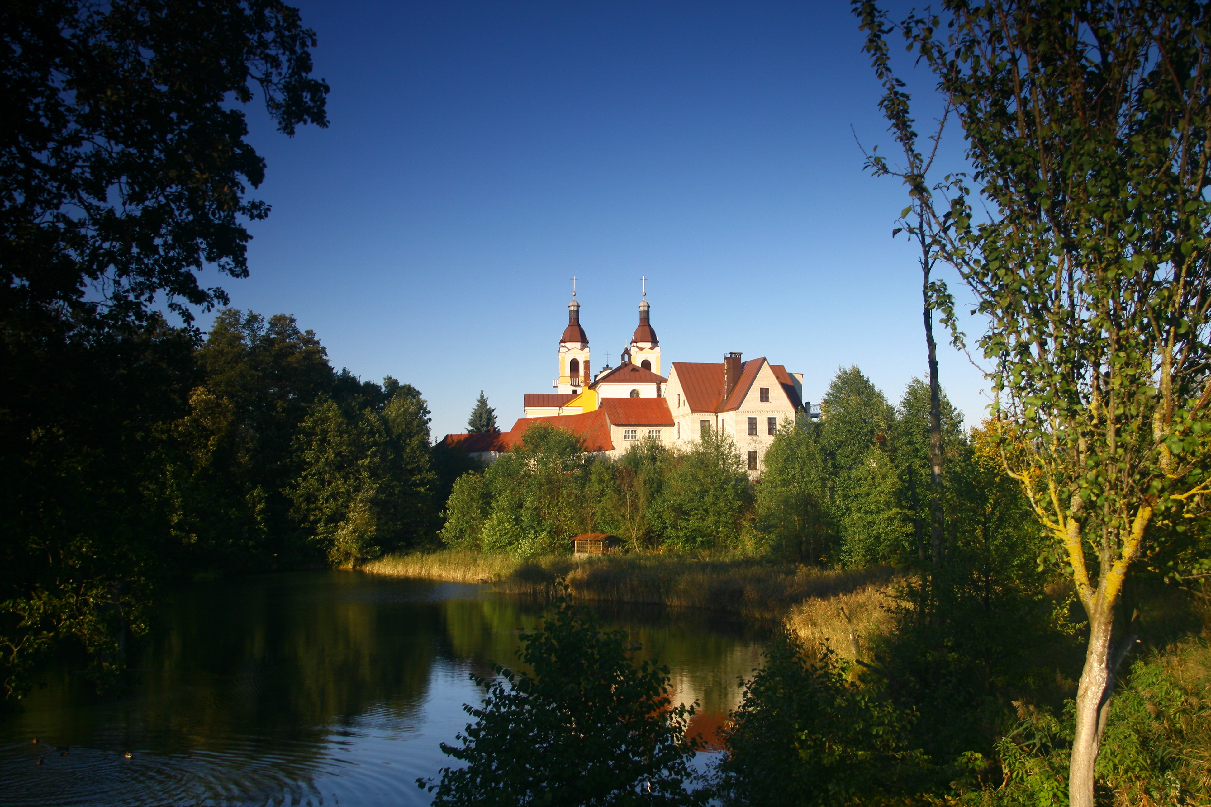 Sapockin, Belarus